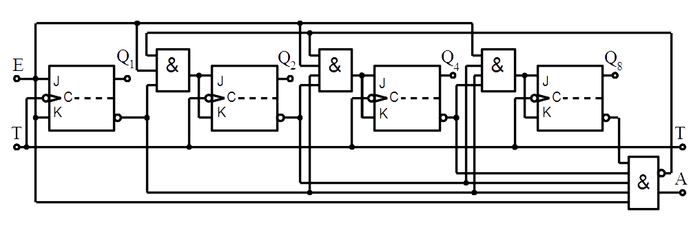 synchroner Dezimalzähler, rückwärts zählend, 8-4-2-1-Code